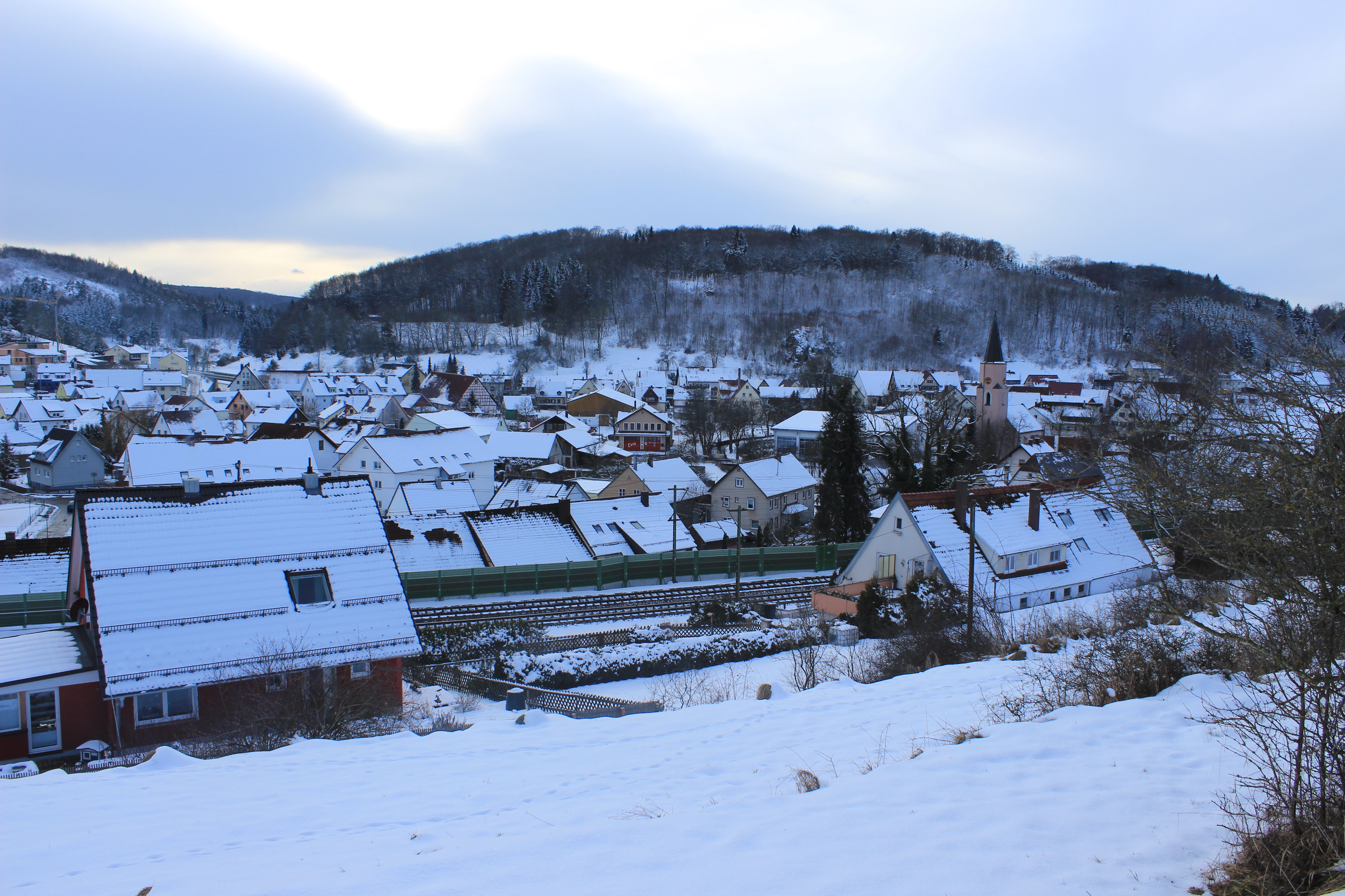 Dieses Foto wurde im Winter 2015 geschossen, als Urspring von einer zarten Schneedecke überdeckt war.